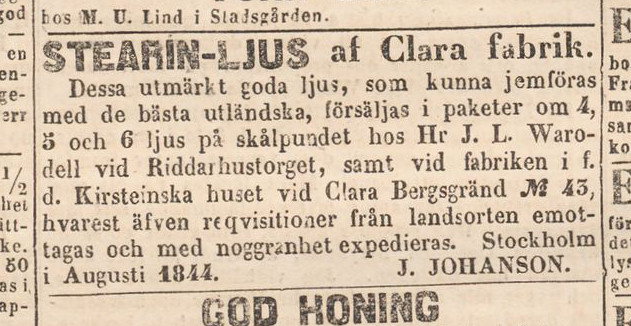 Annons för stearinljus från Clara fabrik, ur Aftonbladet den 7 august 1844.